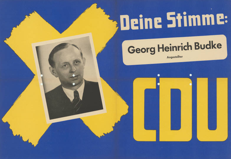 Deine Stimme: Georg Heinrich Budke Angestellter CDU Abbildung: Porträtfoto - Stimmkreuz Plakatart: Kandidaten-/Personenplakat mit Porträt Objekt-Signatur: 10-009 : 155 Bestand: Landtagswahlplakate Nordrhein-Westfalen (10-009) GliederungBestand10-18: Landtagswahlplakate Nordrhein-Westfalen (10-009) » Landtagswahl am 18.6.1950 » CDU » mit Porträtfoto Lizenz: KAS/ACDP 10-009 : 155 CC-BY-SA 3.0 DE